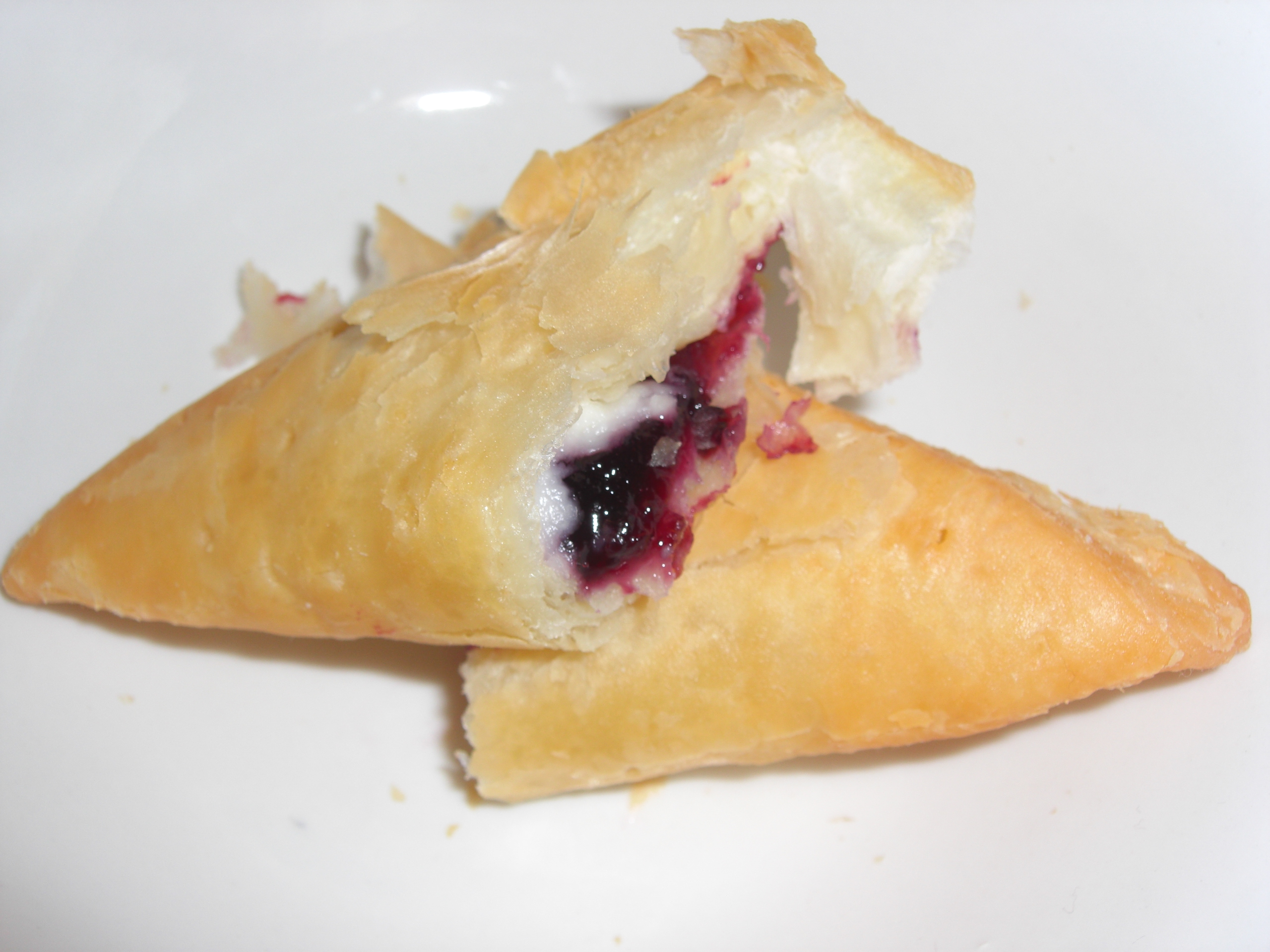 ブルーベリークリームチーズパイ 20121月4日～期間限定